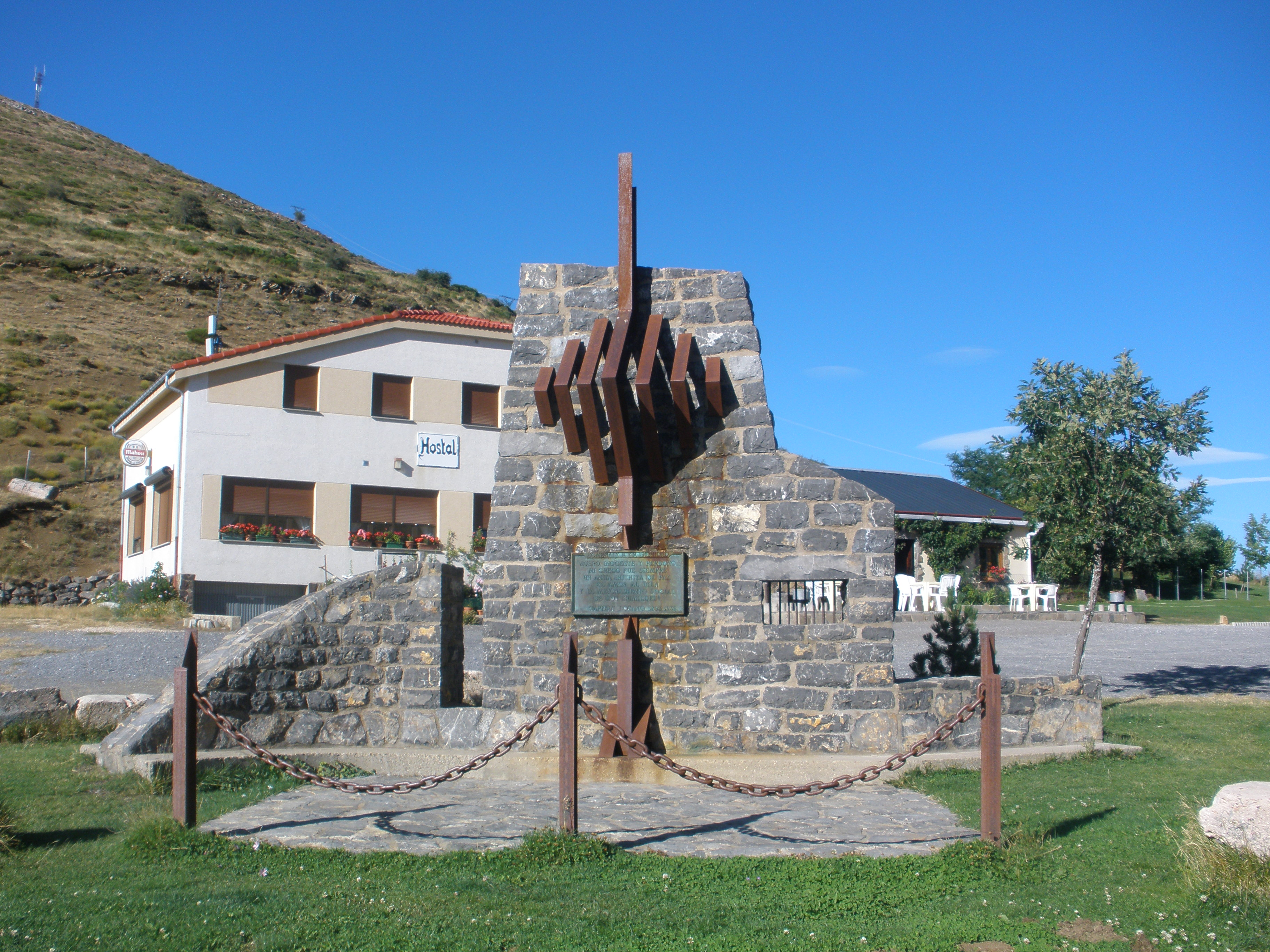 Vista general del monumento en honor del capitán Lozano, en el alto de Aralla, Sena de Luna, junto a los restos de una trinchera de la Guerra Civil en la que se le recordaba (agosto de 2012)